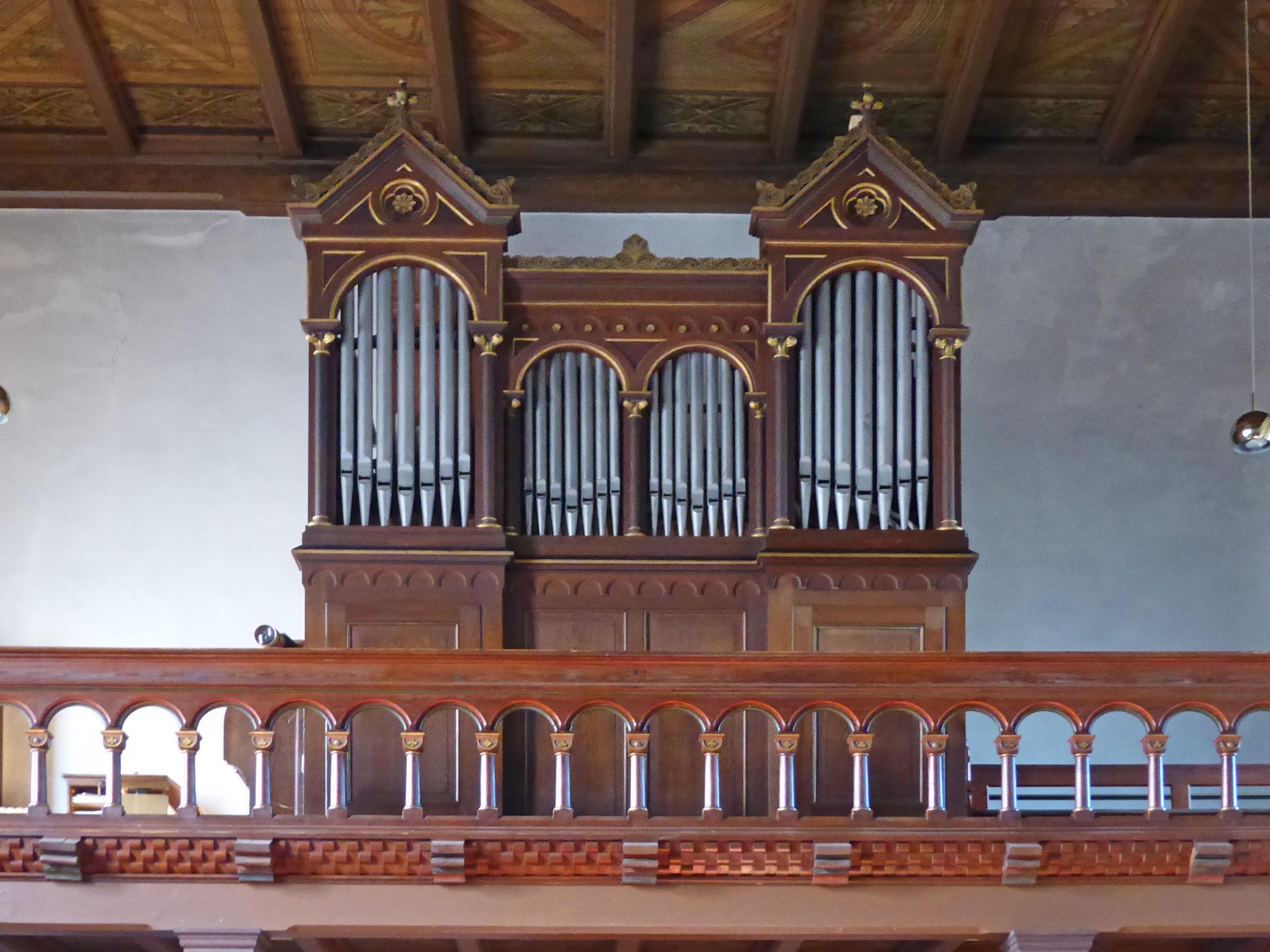 Orgel der katholischen St.-Nikolaus-Kirche in Machtsum.von P. Furtwängler & Hammer, Hannover.